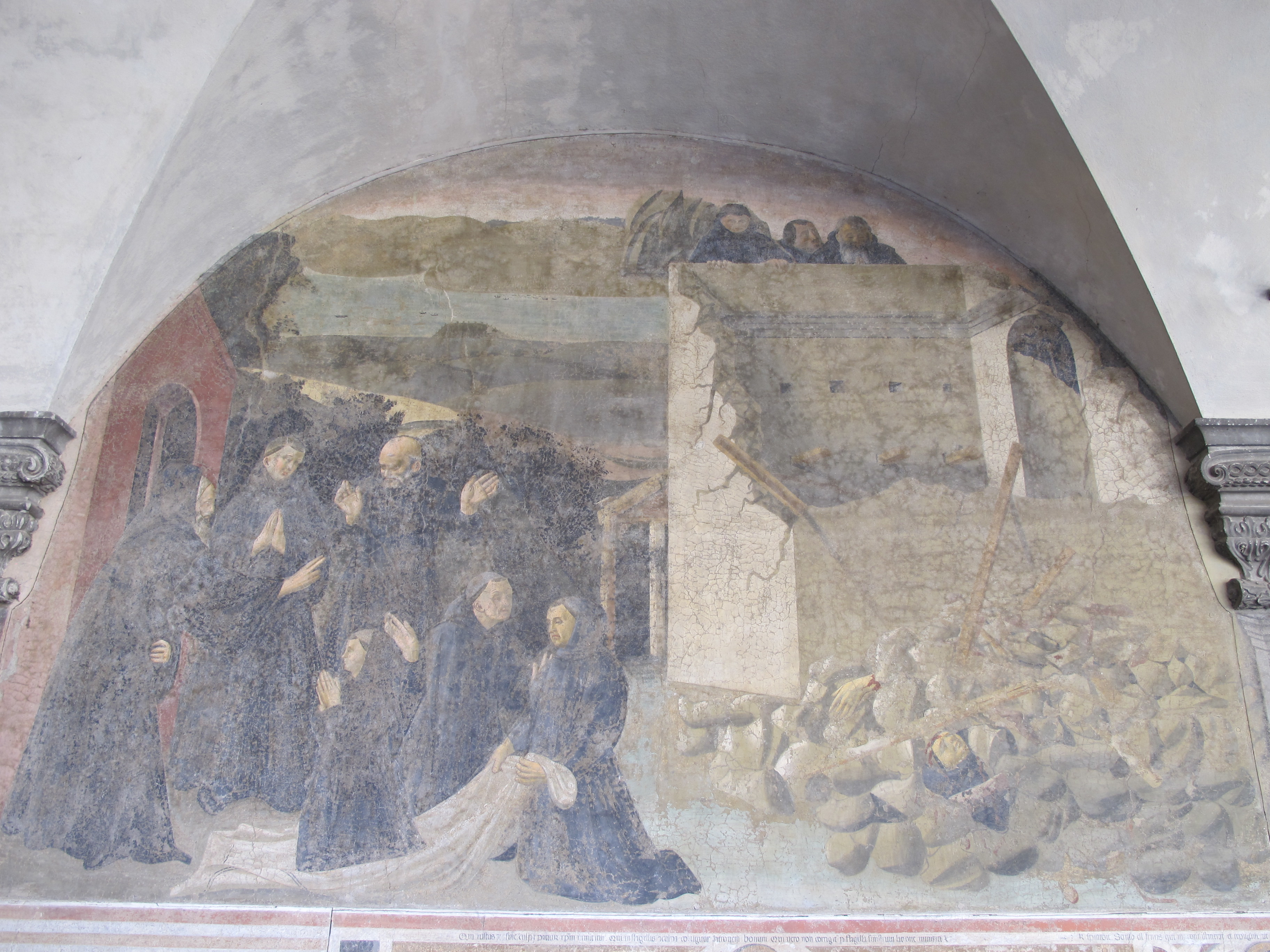 firenze, badia fiorentina